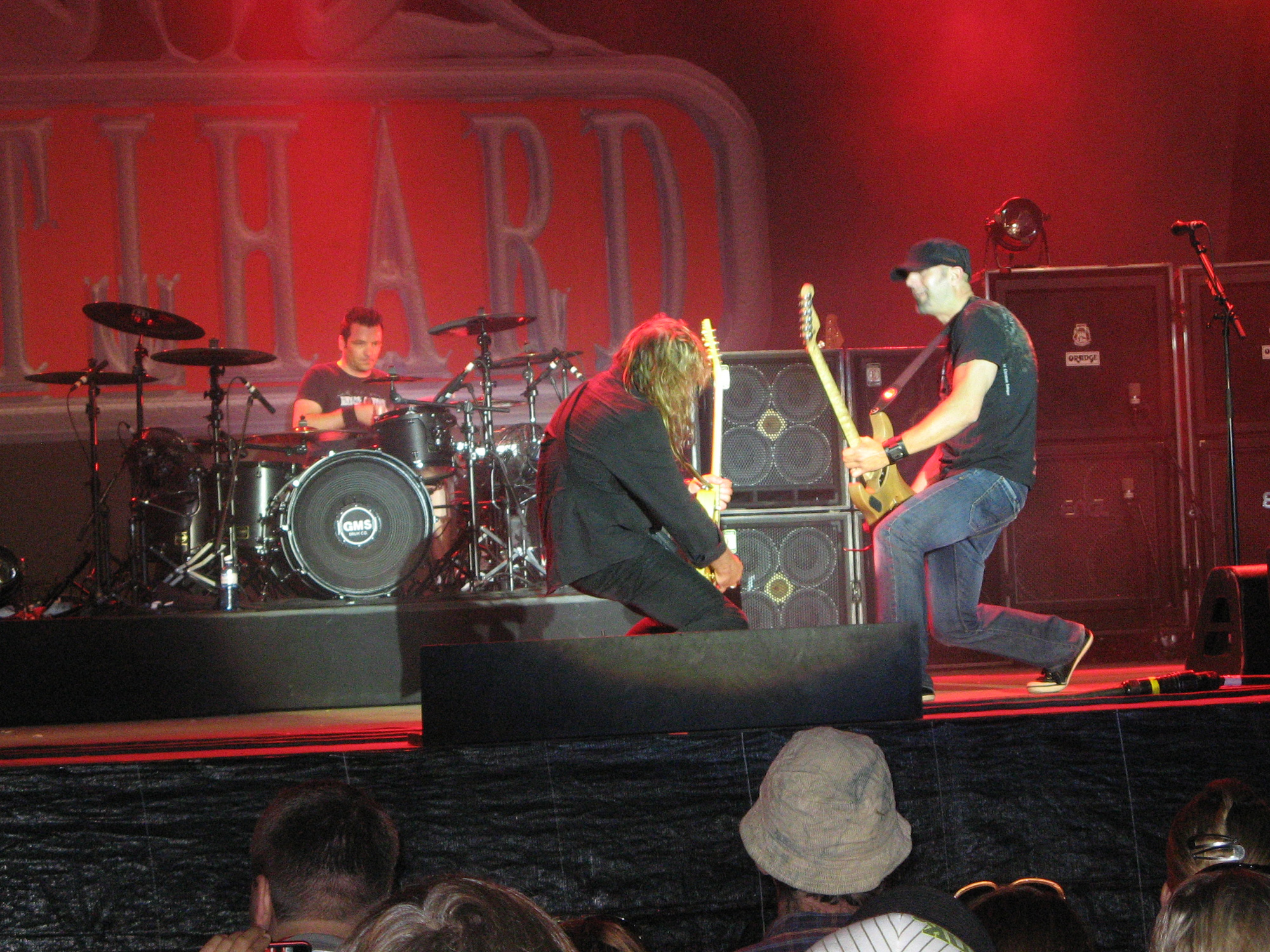 Hena Habegger, Leo Leoni und Freddy Scherer von Gotthard. Aufgenommen am Radio Argovia Fäscht 2010 beim Flugplatz Birrfeld in Lupfig.